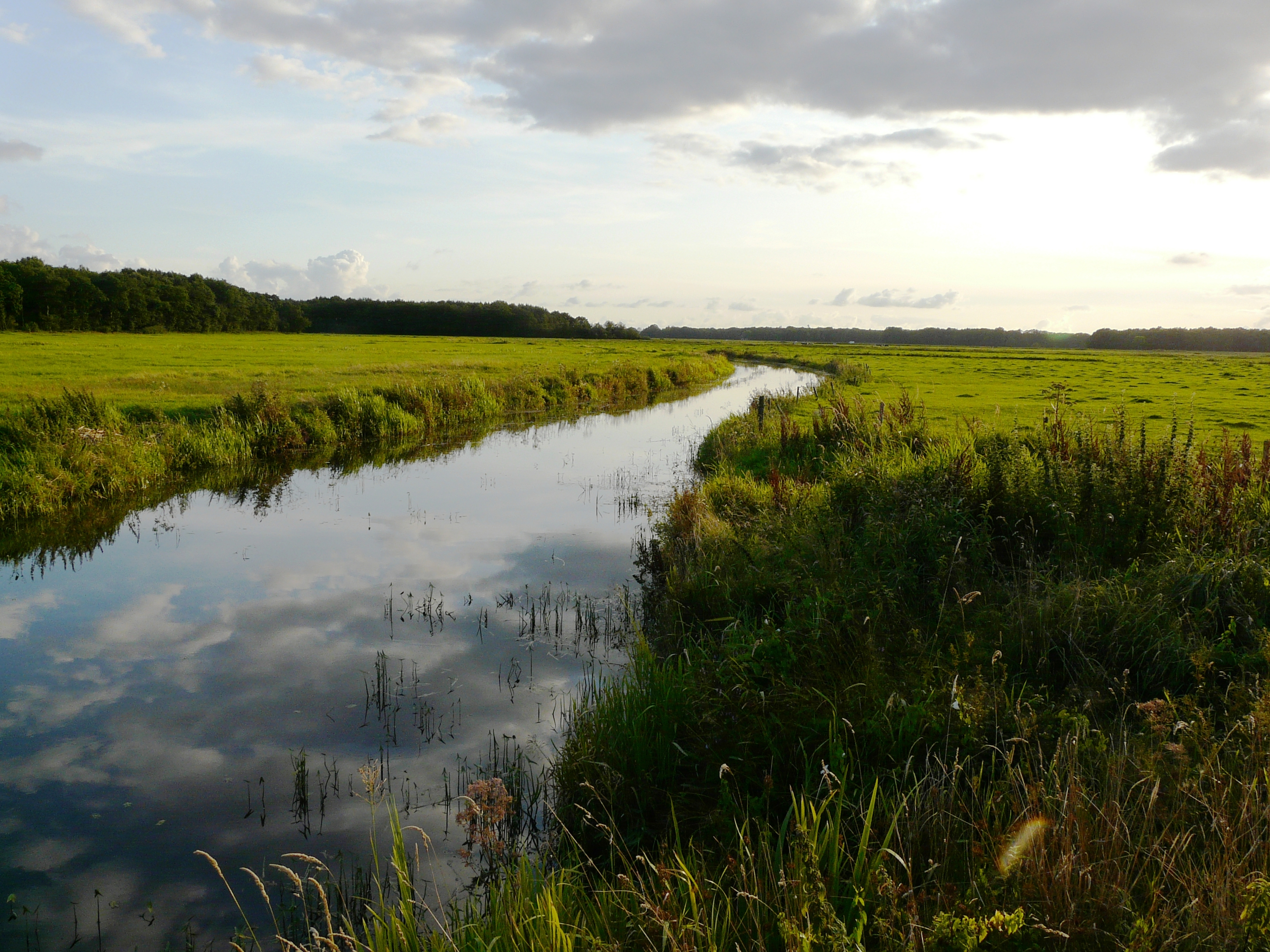 It Alddjip tuske de Opperhaudmare en Heidehuzen.